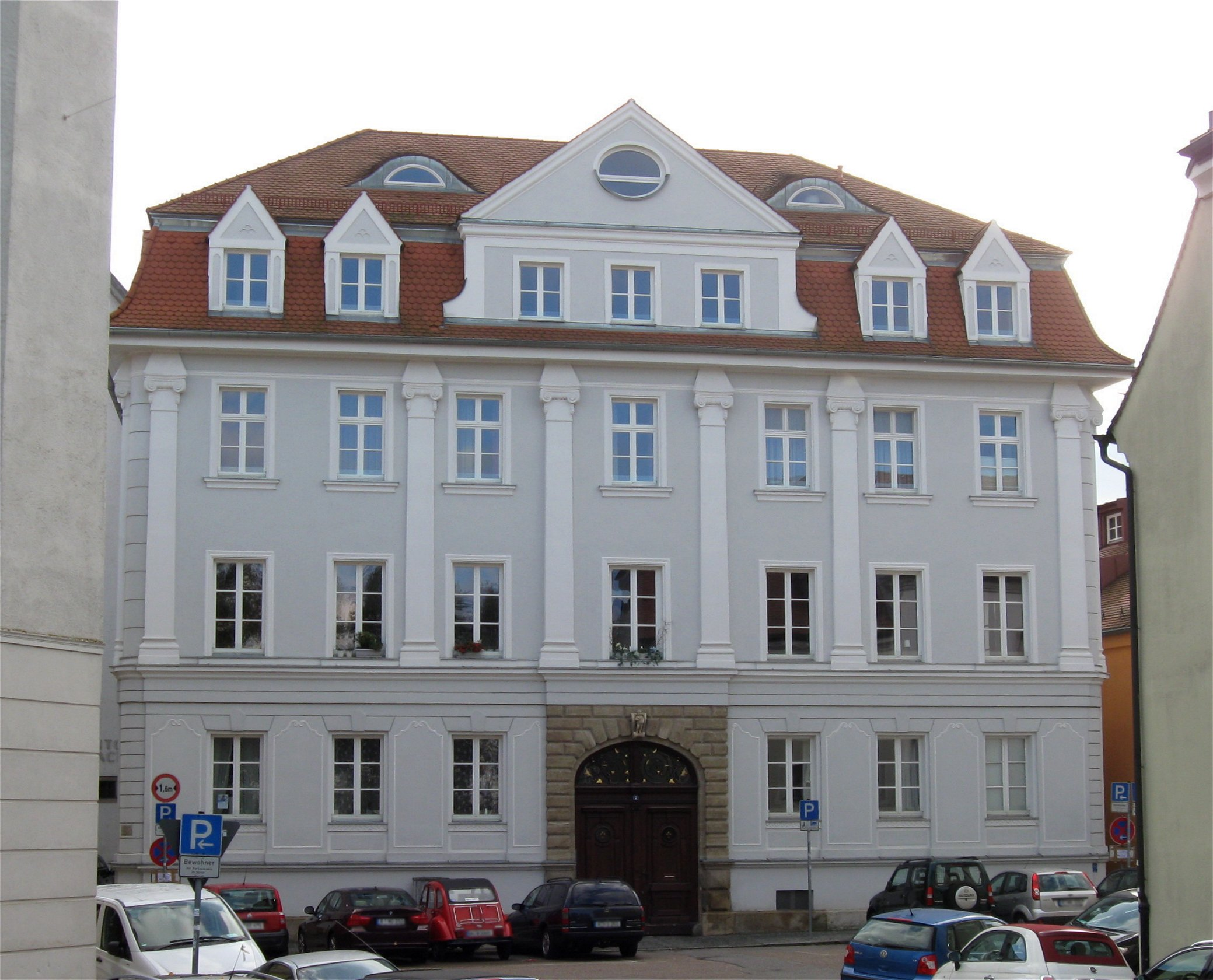 Brunnleite 7; Ehem. Fabrikantenvilla, dreigeschossiger Marsardwalmdachbau mit Bänderung, Pilastergliederung und Zwerchgiebel, neubarock, 1876 von Johann Theodor Madler.